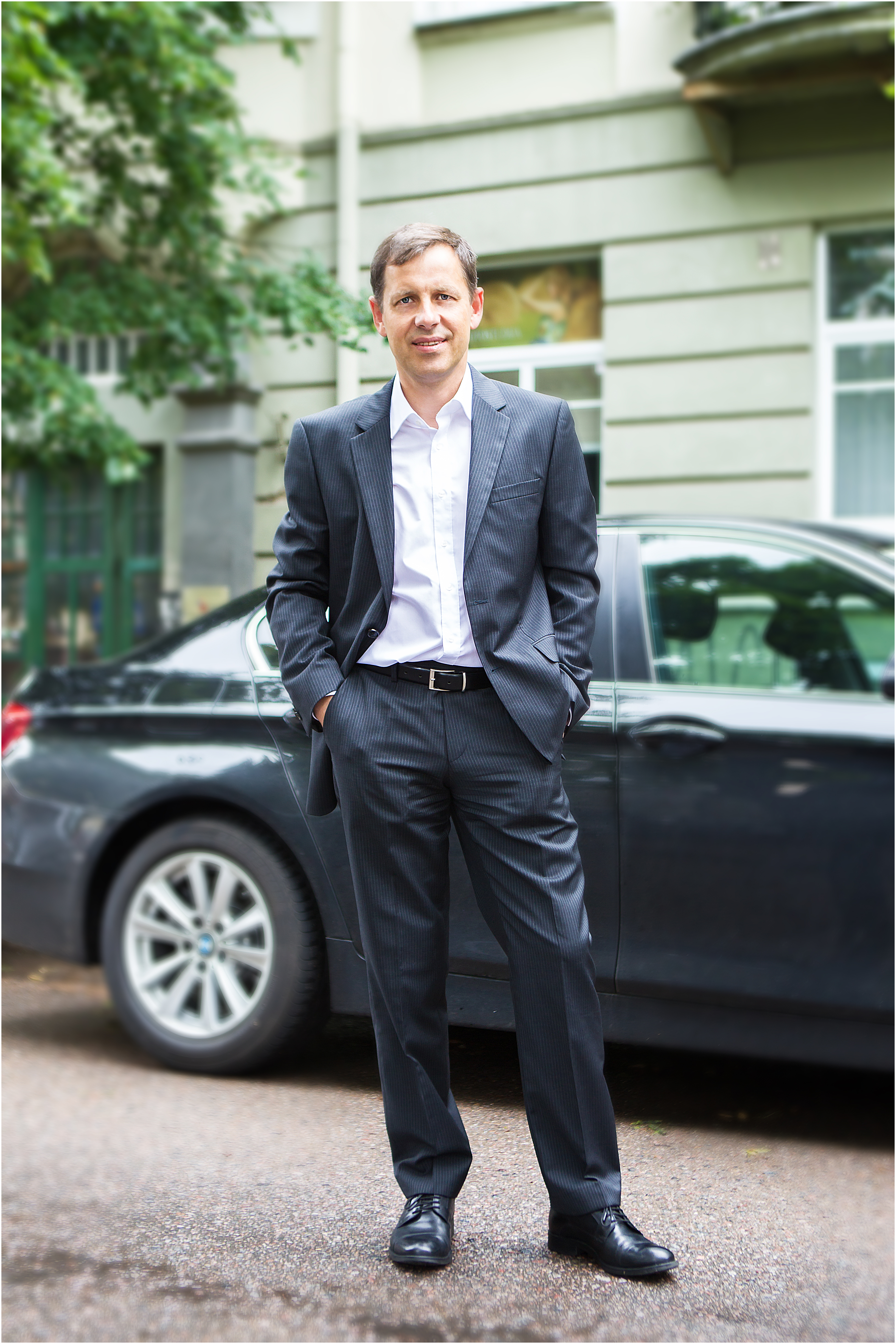 Darius Jonušis